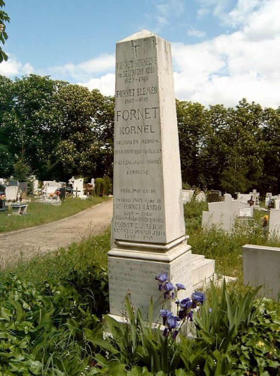 Fornet Kornél (1818. augusztus - 1894. március) mérnök, 1848-as honvédőrnagy (utász), amerikai polgárháborús ezredes sírja Budapesten. Új köztemető: 128-1-92/93